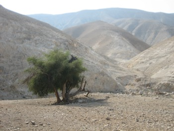 Judean Desert, near Wadi al-Qelt. / Judejska pustinja blizu Wadi al-Qelta, na putu od Jeruzalema prema Jerihonu.